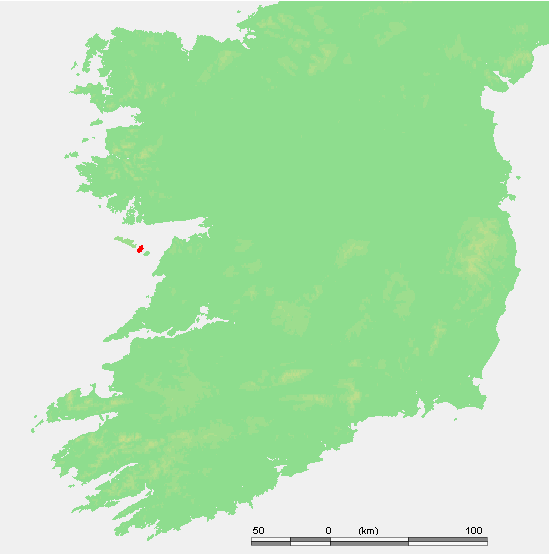 Ireland - Inishmaan.PNG